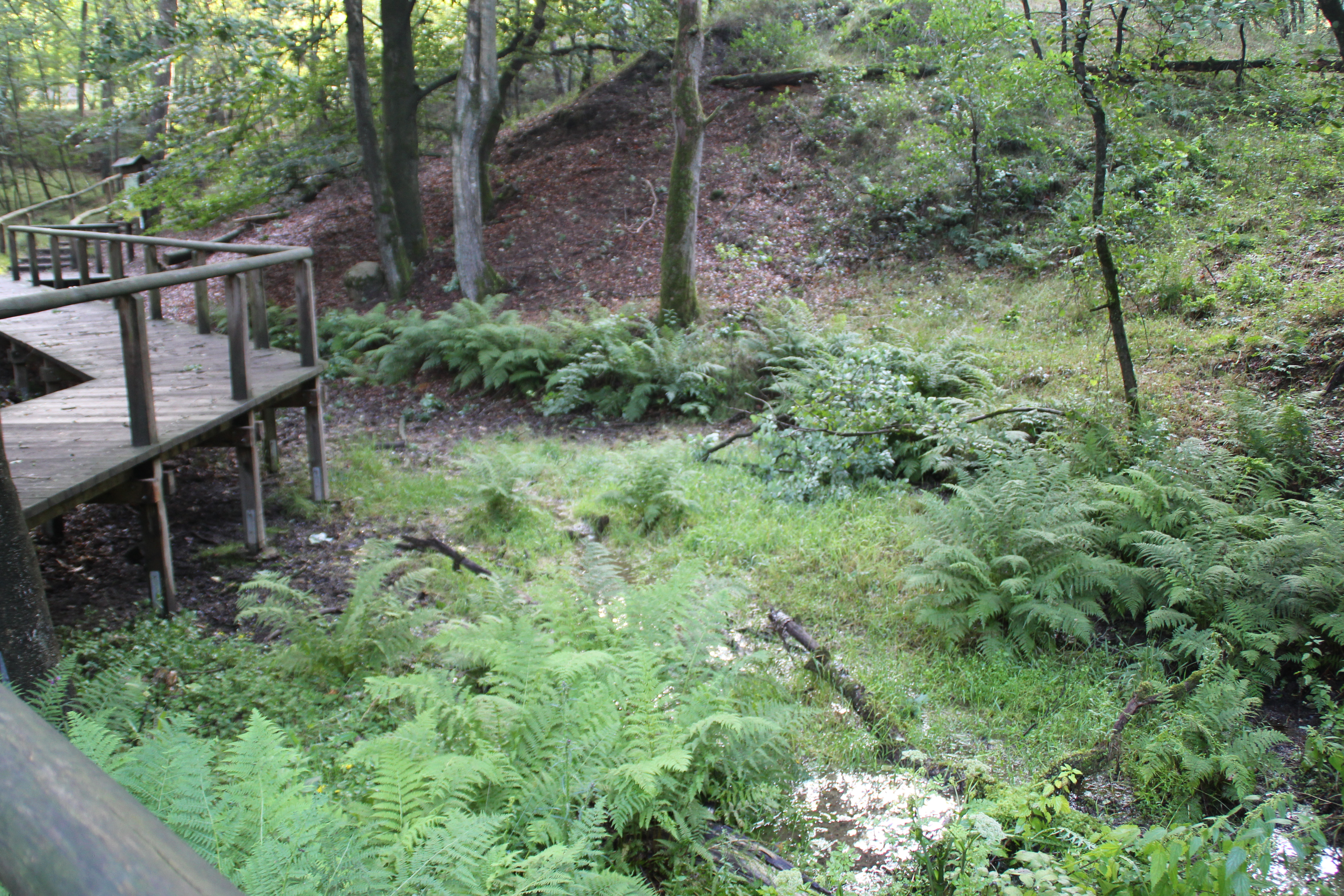 An den Emsquellen bei Schloß Holte-Stukenbrock: Die Ems entspringt den 1995 renaturierten Sickerquellen. Der Quellbereich beginnt etwa in der Bildmitte. Die entspringende Ems fließt nach vorne rechts ab (bachaufwärts betrachtet).